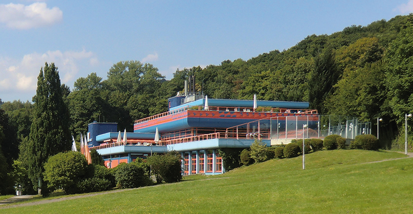 Königstein im Taunus, Kurbad von Südwesten